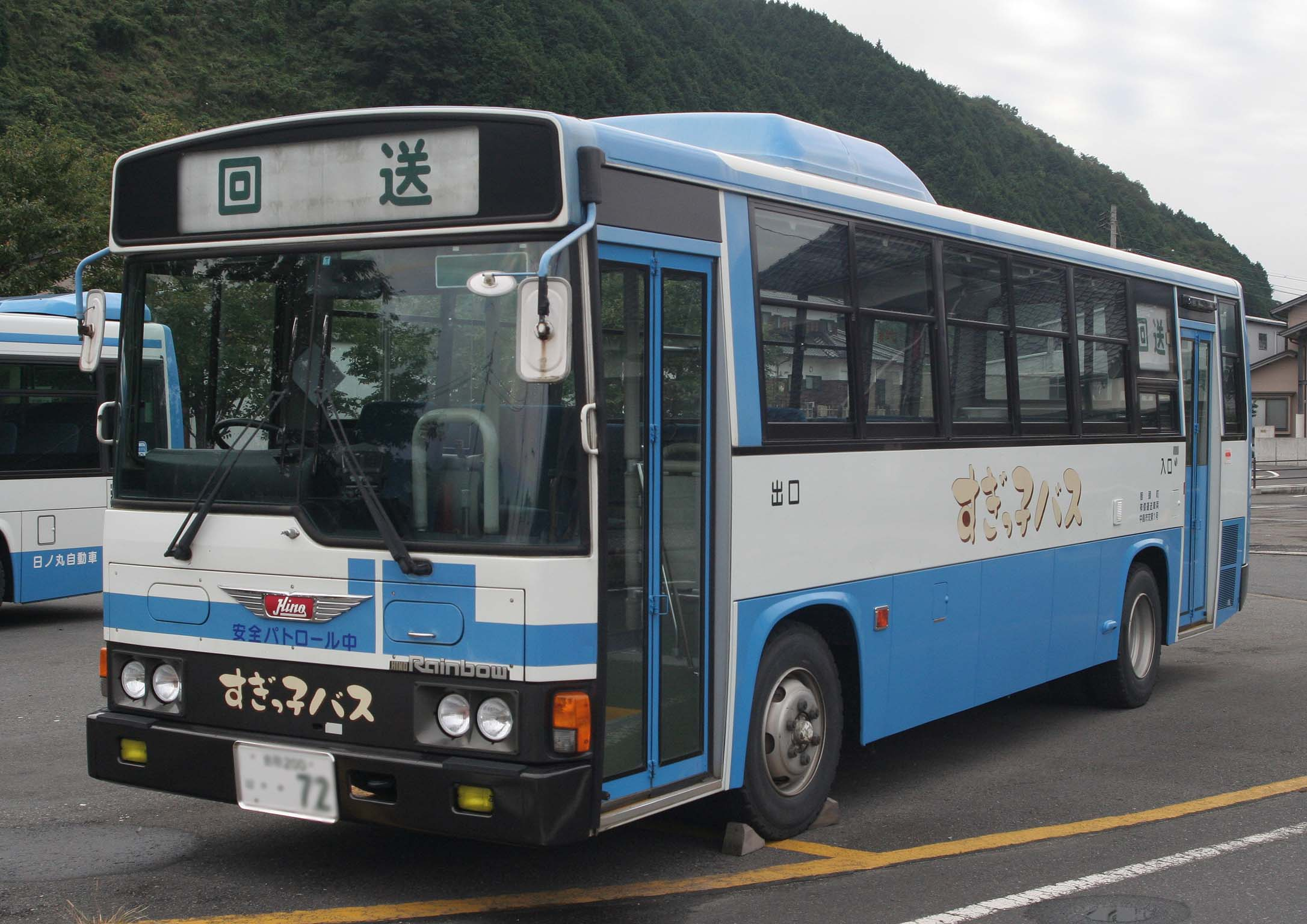 智頭町民すぎっ子バス 智頭駅前にて